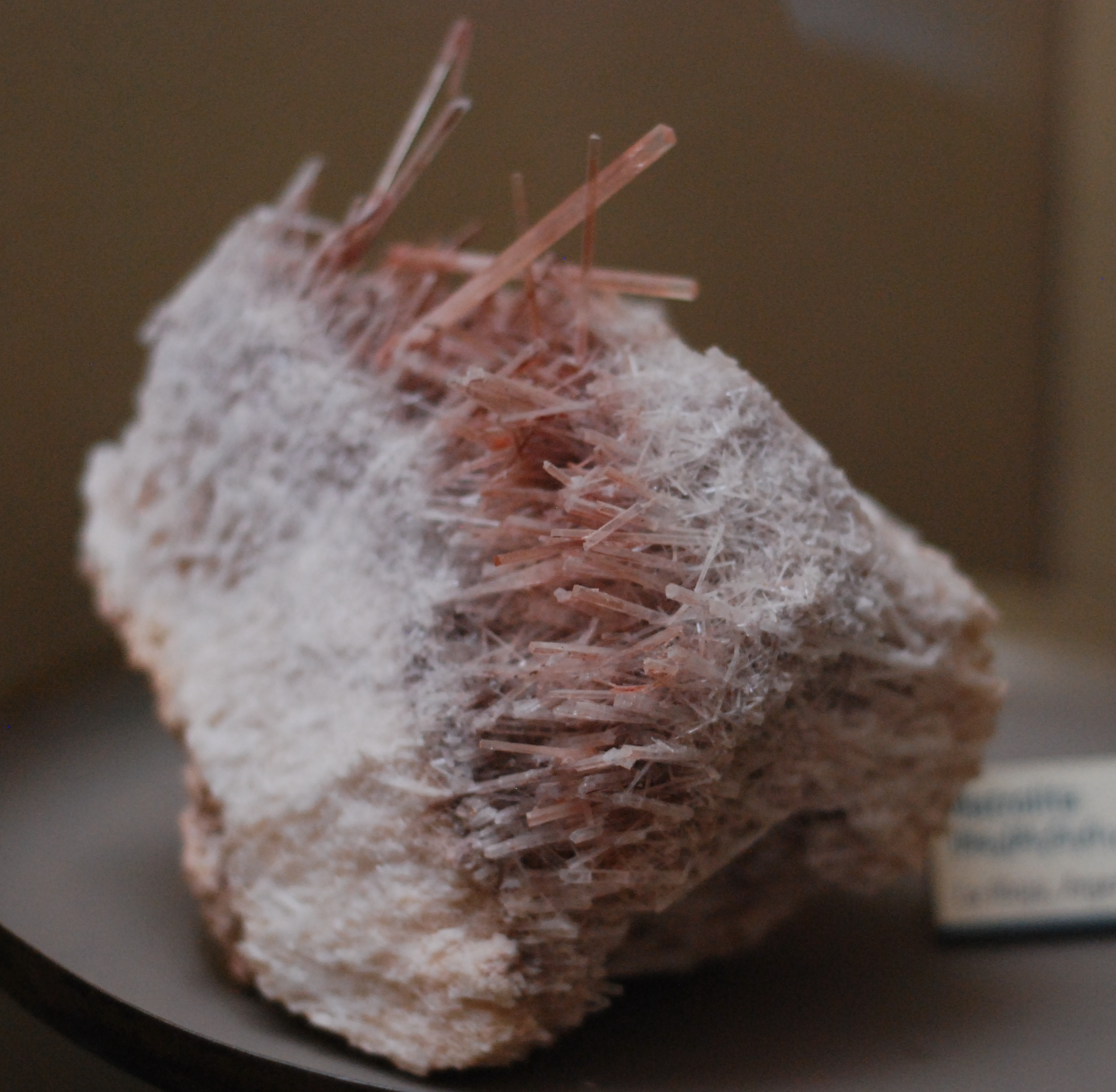 Natrolita (Na2[Al2Si3O10]2H2O. La Rioja, Argentina.